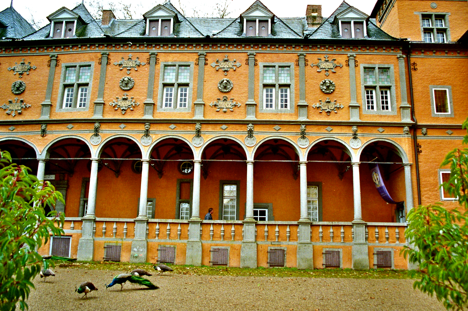 Das Schloss, auch Ritterschloss genannt ist das bedeutendste Baudenkmal der Stadt Mönchengladbachs am Niederrhein. Es liegt im Stadtbezirk Rheydt. Erstmals erwähnt wurde es 1180 in einer Urkunde des Kölner Erzbischofs Philipp von Heinsberg. Wahrscheinlich ist die heutige Anlage der Nachfolgebau einer Turmhügelburg, einer sogenannten Motte. Grabungsfunde weisen darauf hin. Der nachweislich älteste aus Stein gebaute Bau lässt sich auf Anfang des 14 Jhd. datieren, war etwa 12X12 m in der Grundfläche und hatte im Süden einen Turm. Gerhard II von Rheydt wird 1443 wegen andauernden Raubrittertums mit der Reichsacht belegt und 1464 wird die Anlage durch die Kaufleute aus Lüttich und Köln wegen weiterhin anhaltender Strassenräuberei vollkommen zerstört. 1468 lässt Wilhelm V von Nesselrode die Anlage wieder aufbauen und zwar wesentlich größer als die Vorgängerburg. Die Fassadenlänge ist jetzt fast 46 m lang. Mitte des 16 Jhd wird dann die Burg zu einen repräsentativen Herrenhaus mit Vorburg, Torburg, Wallanlagen, und Bastionen ausgebaut. Aus dieser Zeit stammt auch das Aussehen der Anlage im italienische Renaissance Stil. Heute ist der größte Teil der Anlage für Besucher zugänglich, einschließlich der Wallanlagen und der Kasematten. Außerdem beinhaltet das Schloß ein städtisches Museum mit Sammlungen der Kunst und Kultur aus der Renaissance und des Barocks. Die Aufnahmen wurden am Spätnachmittag des 6.März 2007 bei starken Regen mit einer Nikon F5 gemacht. Johannes Heribert Pohl